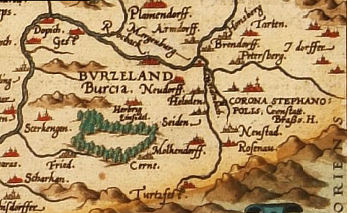 Map of Burzenland